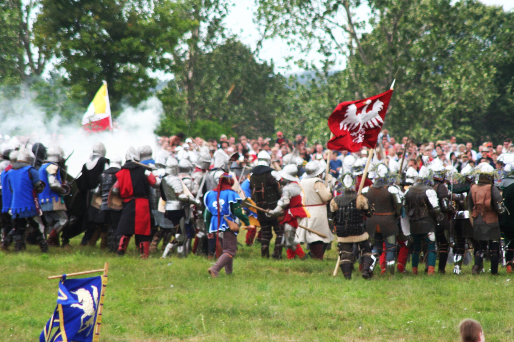 15.07.2006, inscenizacja bitwy pod Grunwaldem.